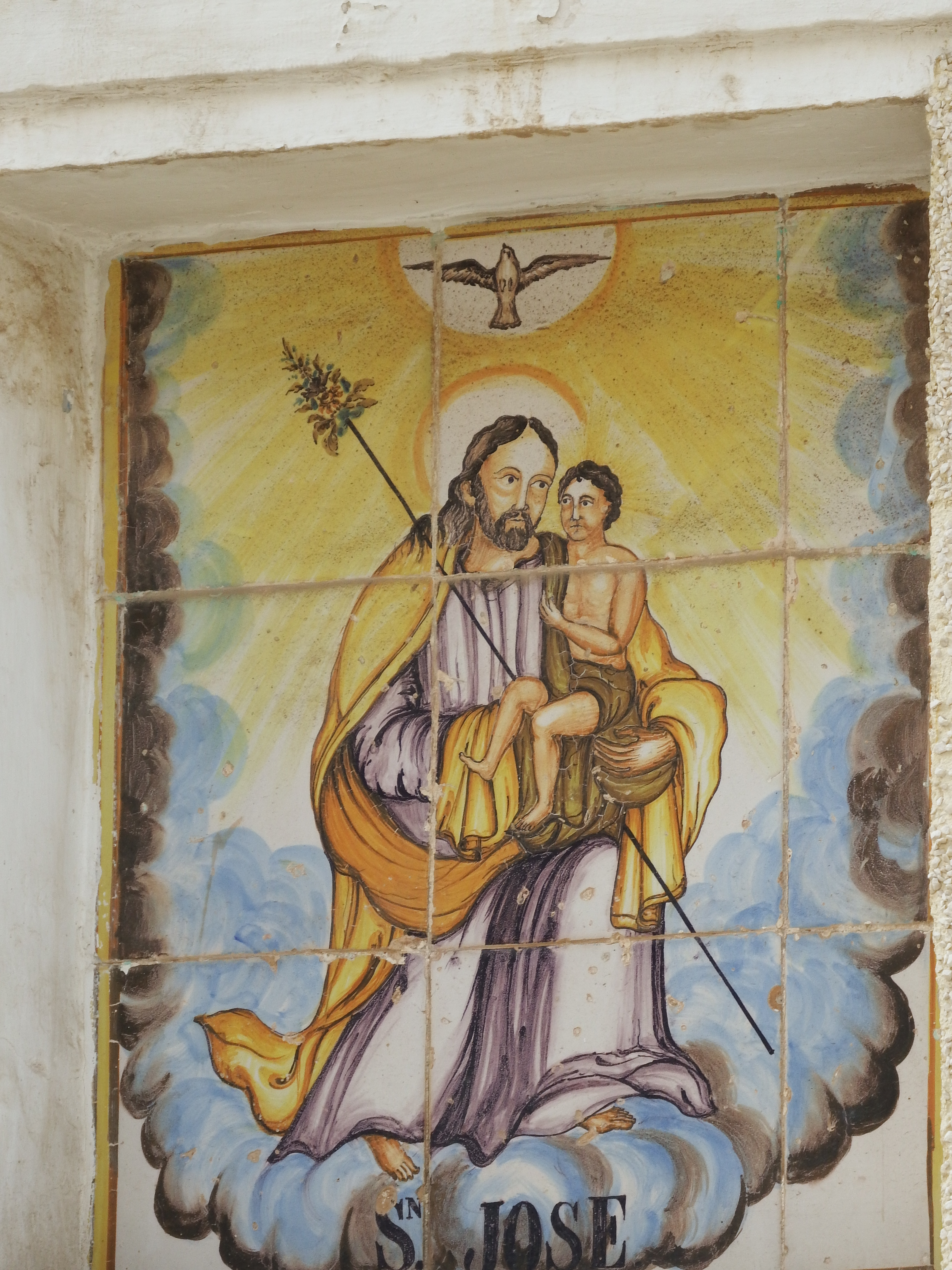 Retablo cerámico de San José en calle San José 19, Torrente